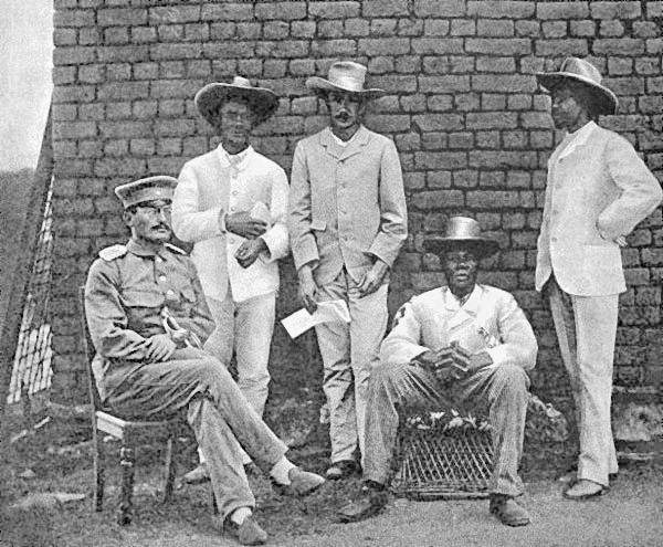 V.l.n.r.: Theodor Leutwein (ganz links), Herero-Führer aus Otjimbingwe: Zacharias Zeraua (2.v.l.), Dolmetscher Kleinschmidt (Mitte), Herero-Führer aus Omaruru: Manasse Tyiseseta (4.v.l.) und der oberste Herero-Führer Samuel Maharero (rechts) im Jahr 1895.